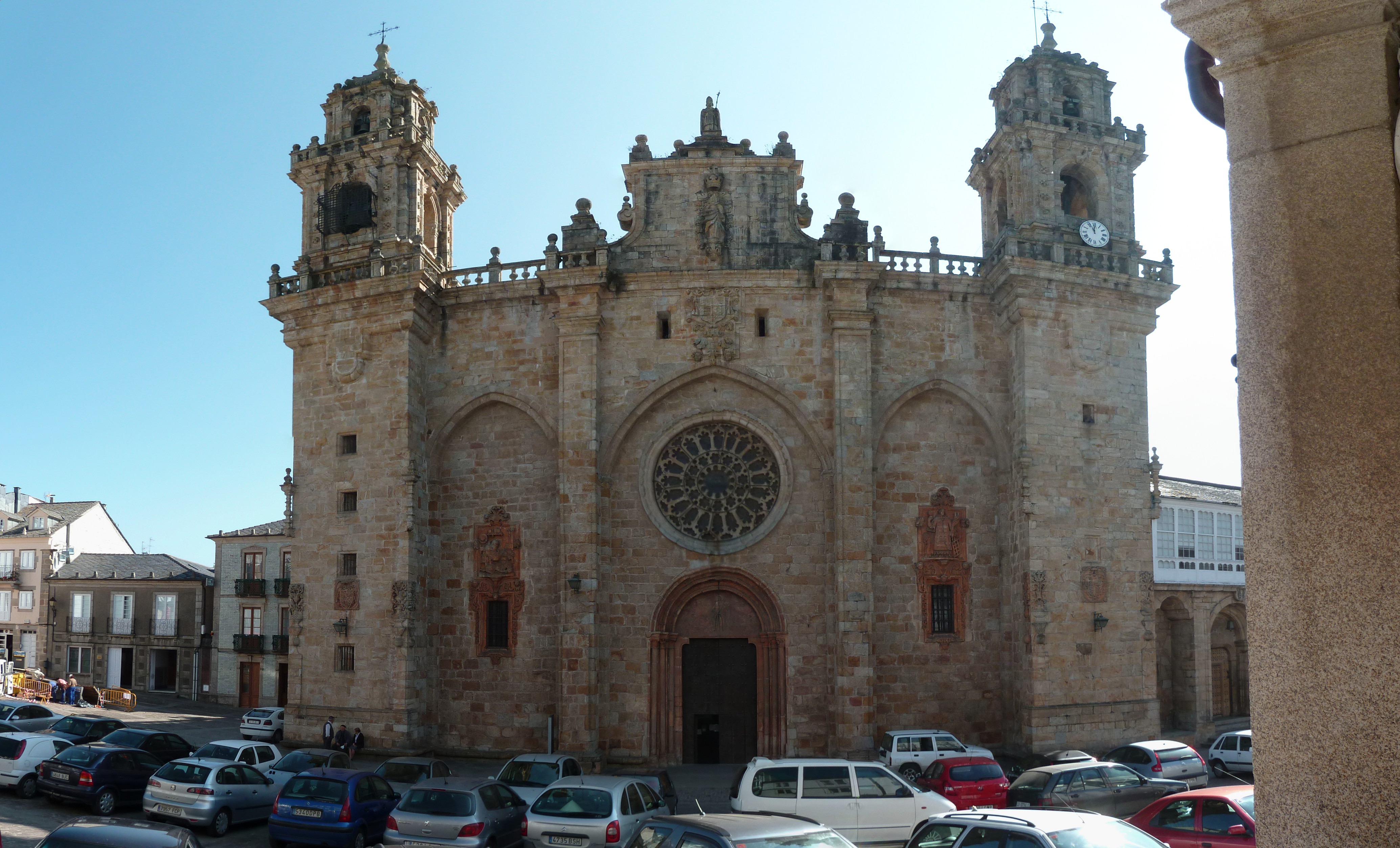 Vista frontal de la catedral de Mondoñedo.